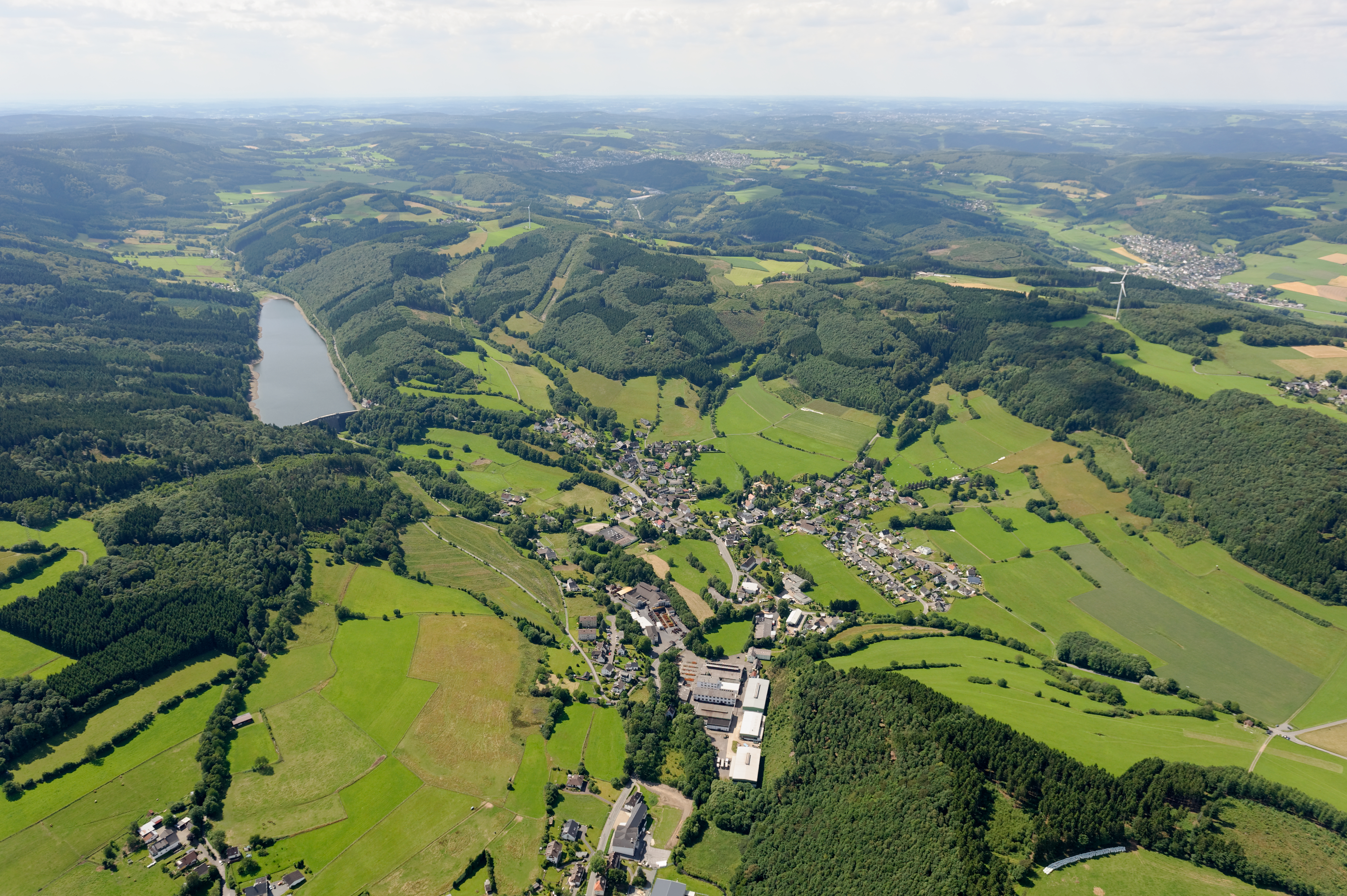 Fotoflug Sauerland West. Plettenberger Ortsteil Himmelmert; Oestertalsperre; rechts oben Hüinghausen. The making of this document was supported by the Community-Budget of Wikimedia Germany.